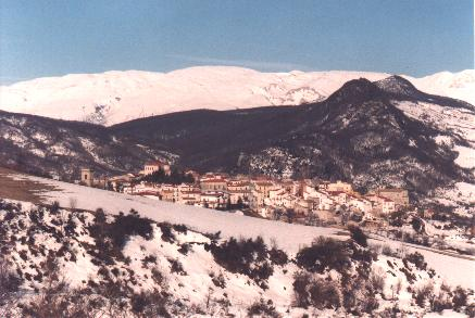 Panoramica di Borrello